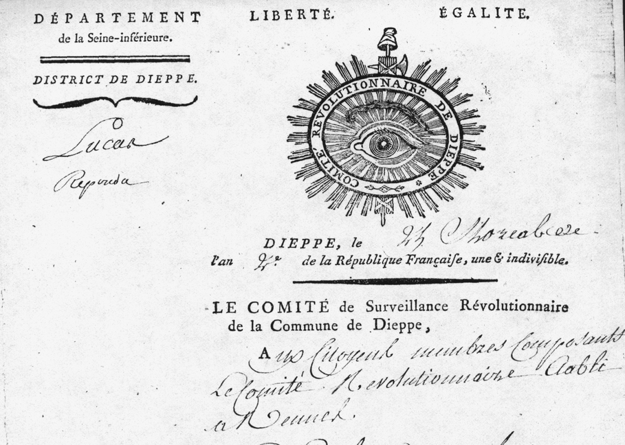 Entête du courrier du Comité de surveillance révolutionnaire de Dieppe en l'an 2. Hauteur de la vignette : 6 cm. (Cote L 1488).